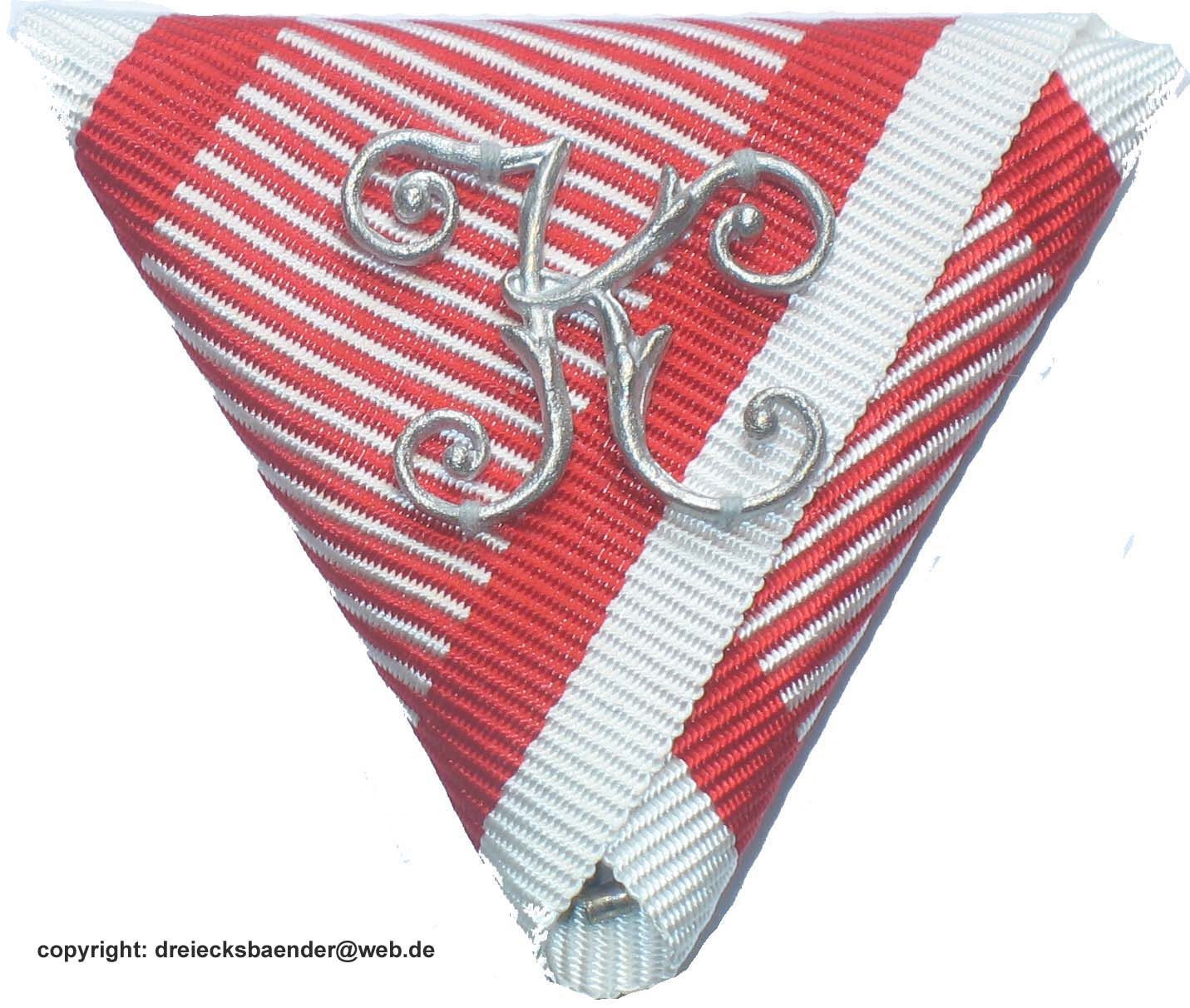 Tapferkeitsband mit "K"-Auflage